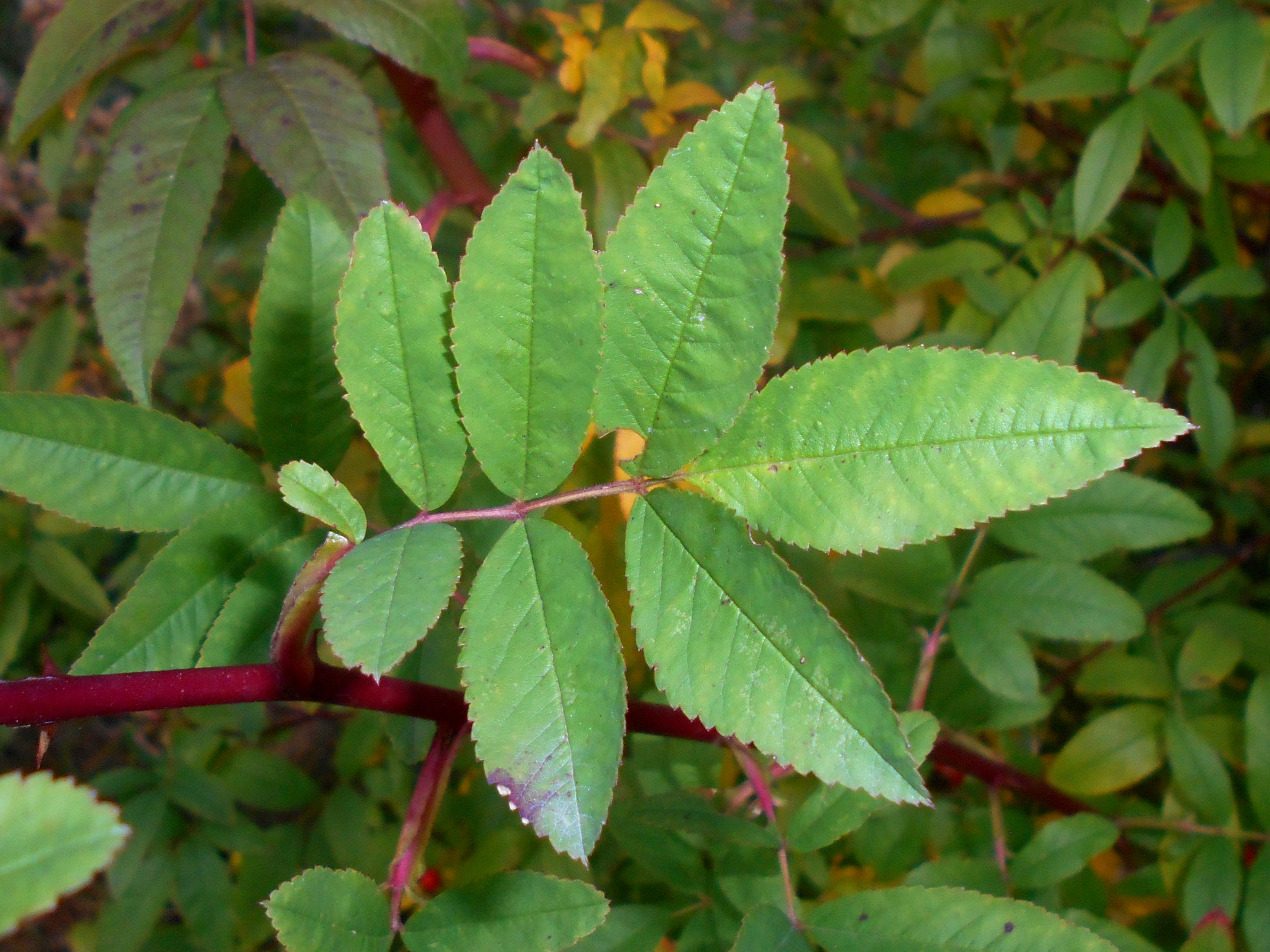 Róża błotna (Rosa palustris), Ogród Botaniczny Uniwersytetu Wrocławskiego.